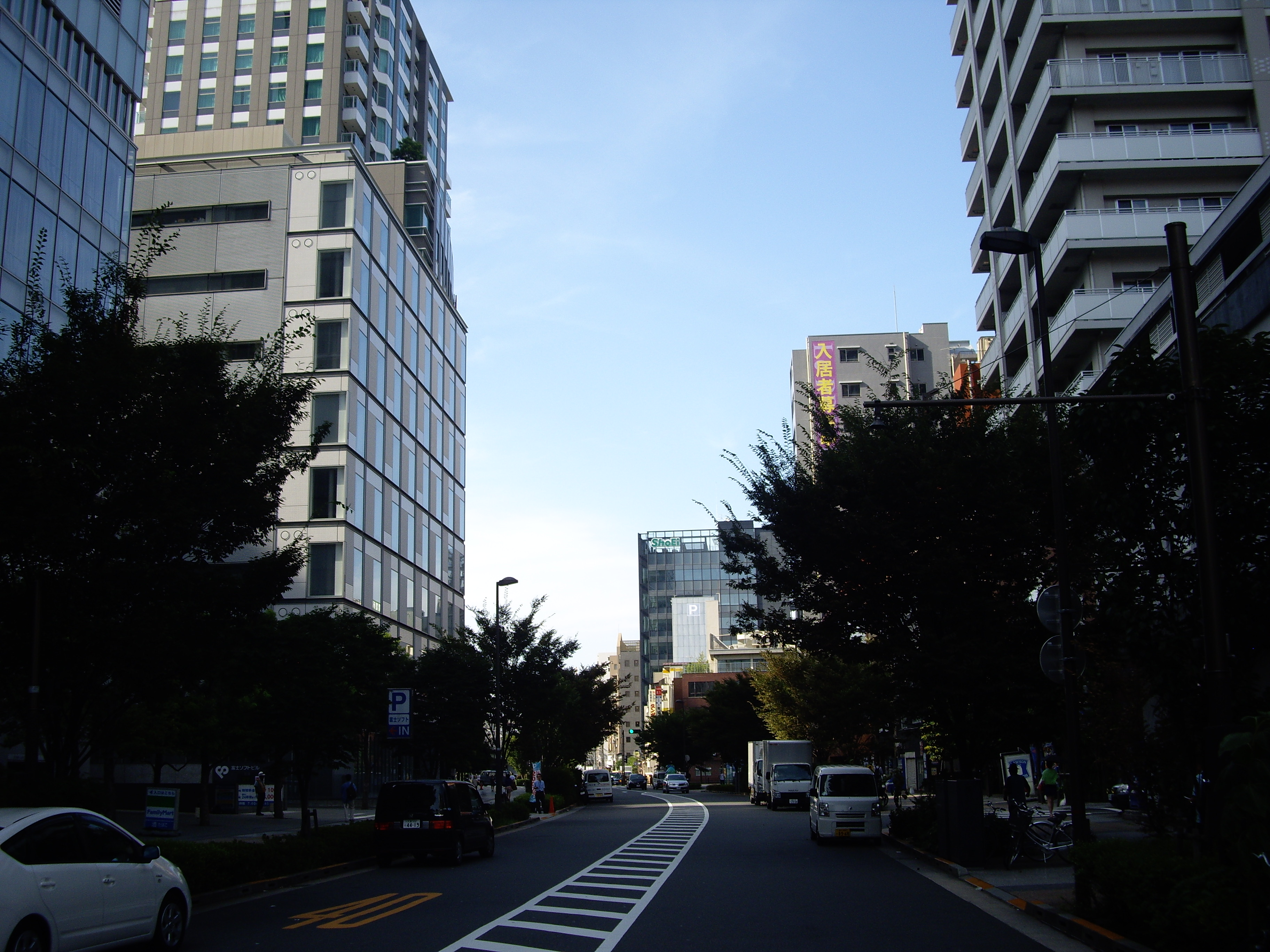 神田練塀町